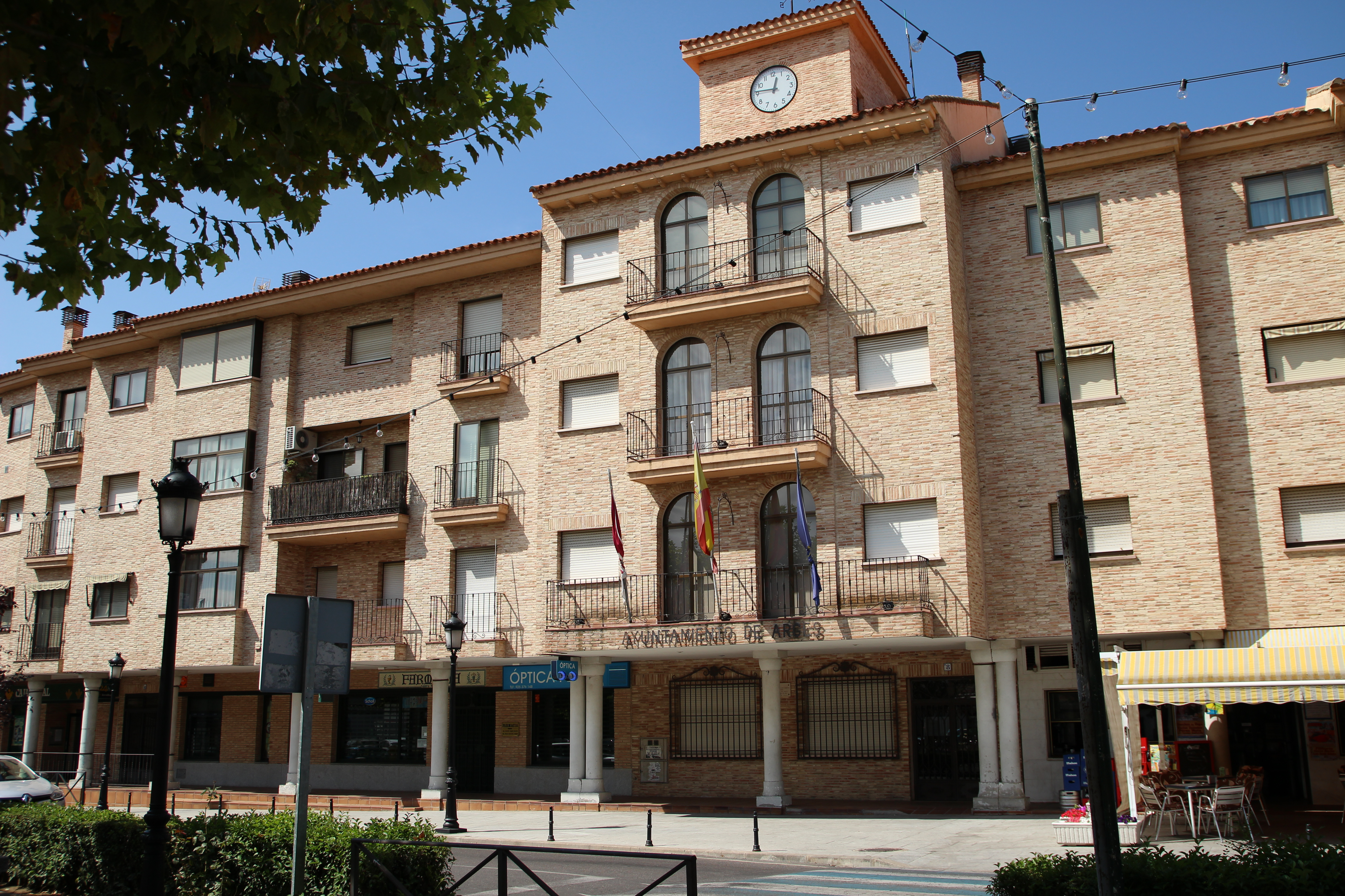 Fachada del Ayuntamiento de Argés (Toledo)